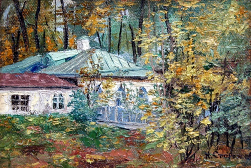 Сторожевский, Николай Николаевич. "Осенний пейзаж с домом". 1900-1910